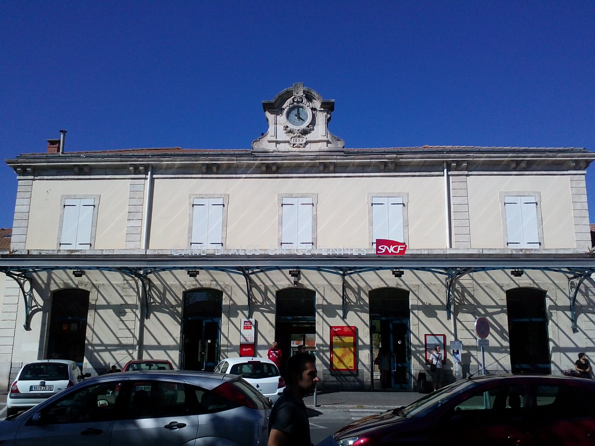 Gare d'Alès-2012